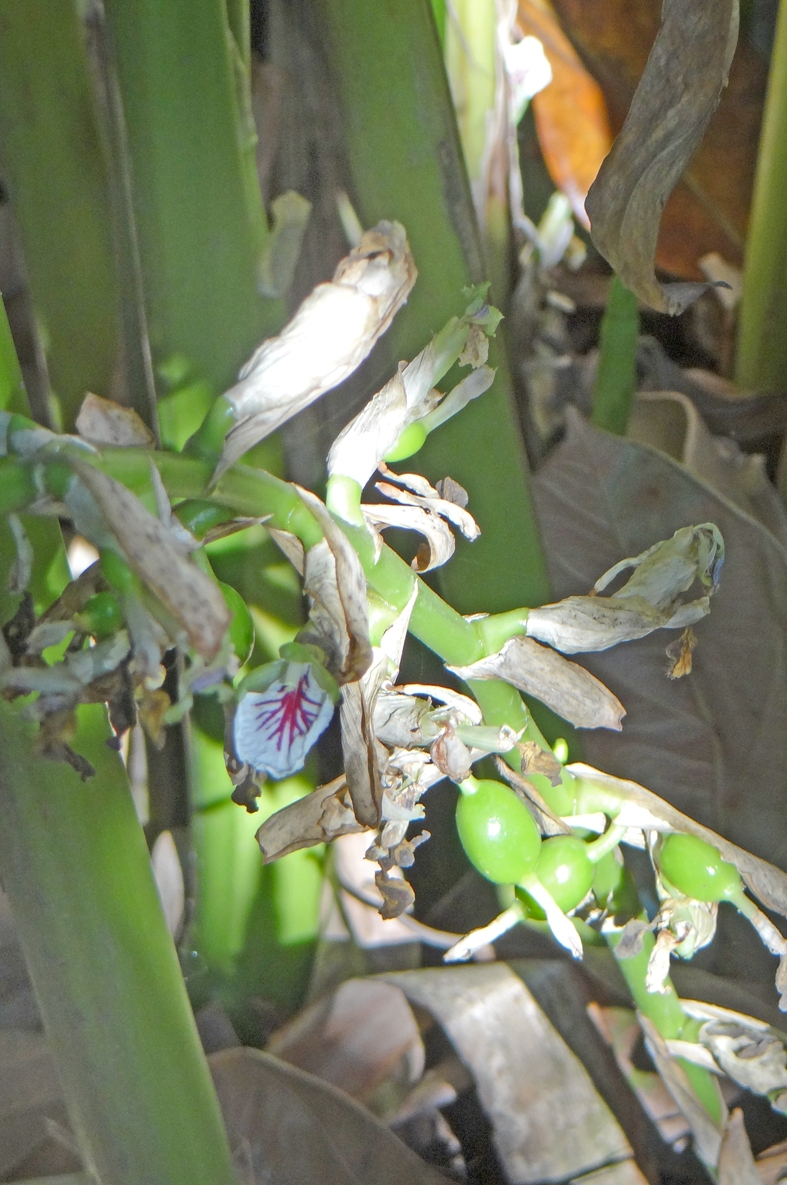 La cardamome est une plante herbacée à rhizome, originaire du Kerala. Ses fruits sont situés à la base de la plante.